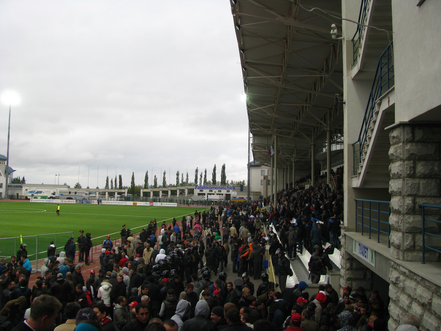 Стадион "Динамо" во время матча "Уфа" - "Урал"